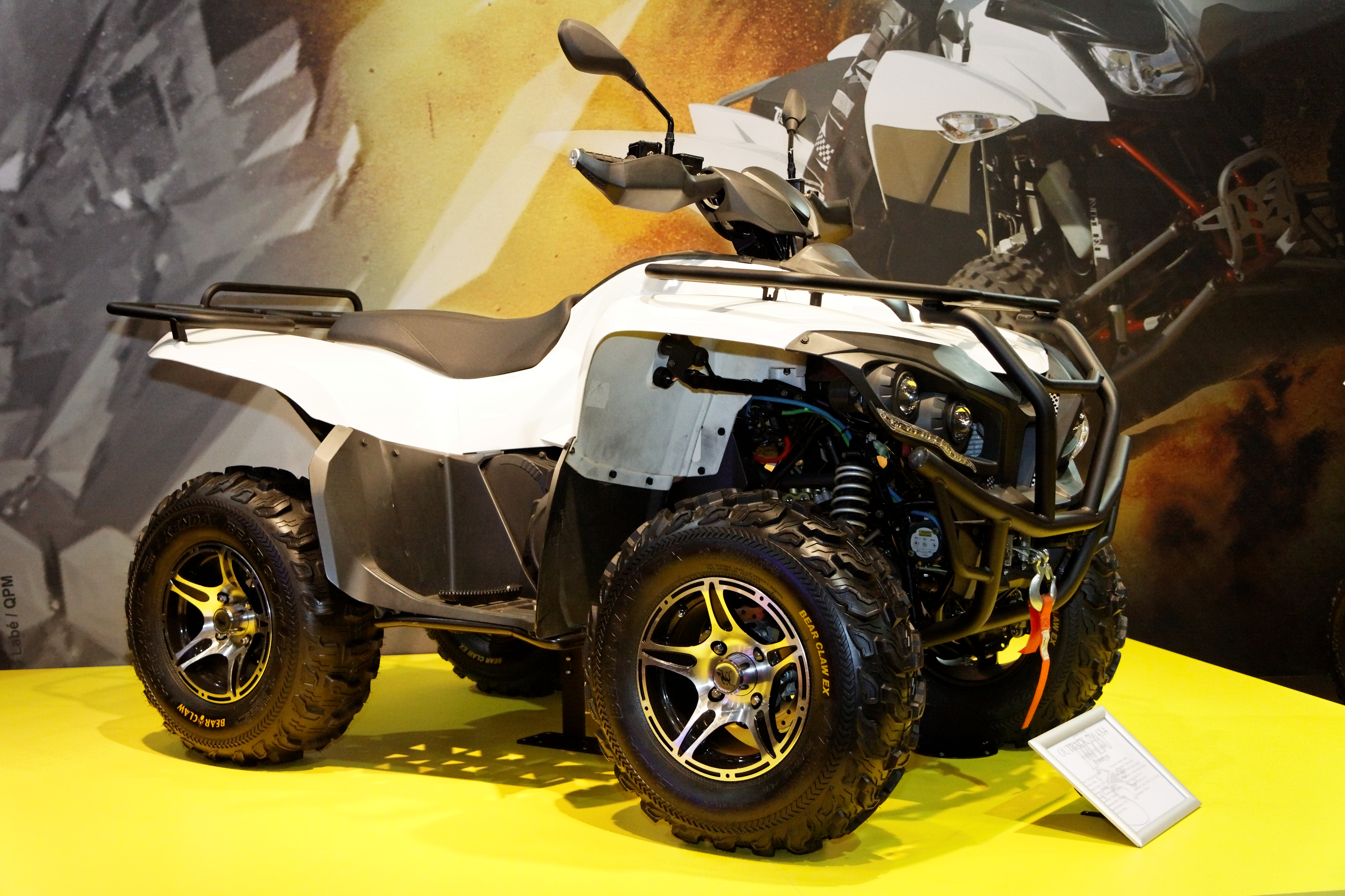 SYM - Outback 700 4X4